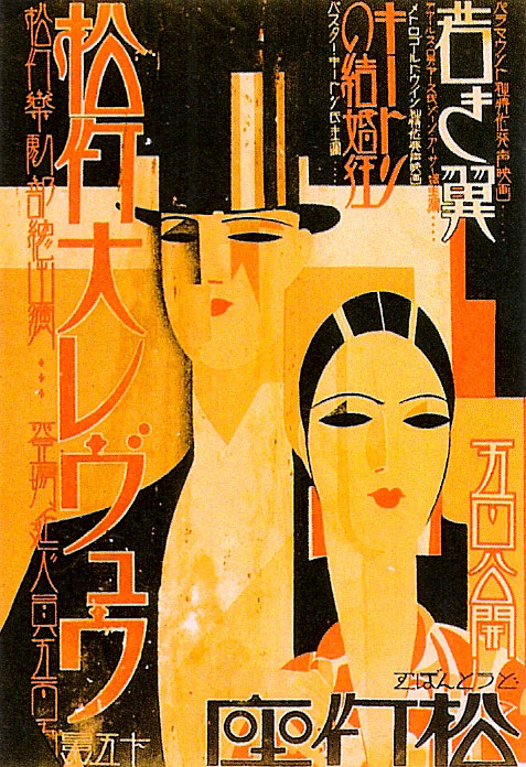 大阪松竹座にて、松竹楽劇部（後のOSK）による「松竹大レヴュウ」ポスター。 併演の映画は、「若い翼」(Young Eagles)および「キートンの結婚狂」(Spite Marriage)